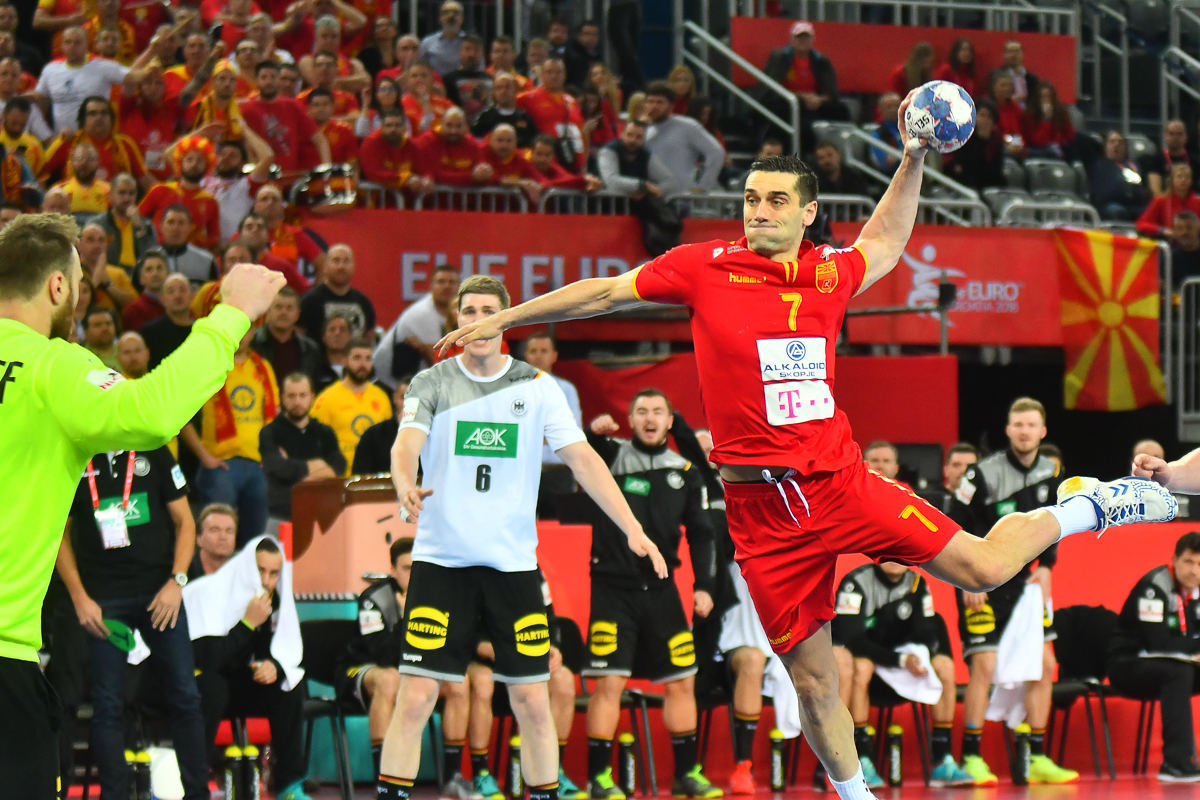 EHF EURO 2018 Germanija - Makedonija 17.01.2018